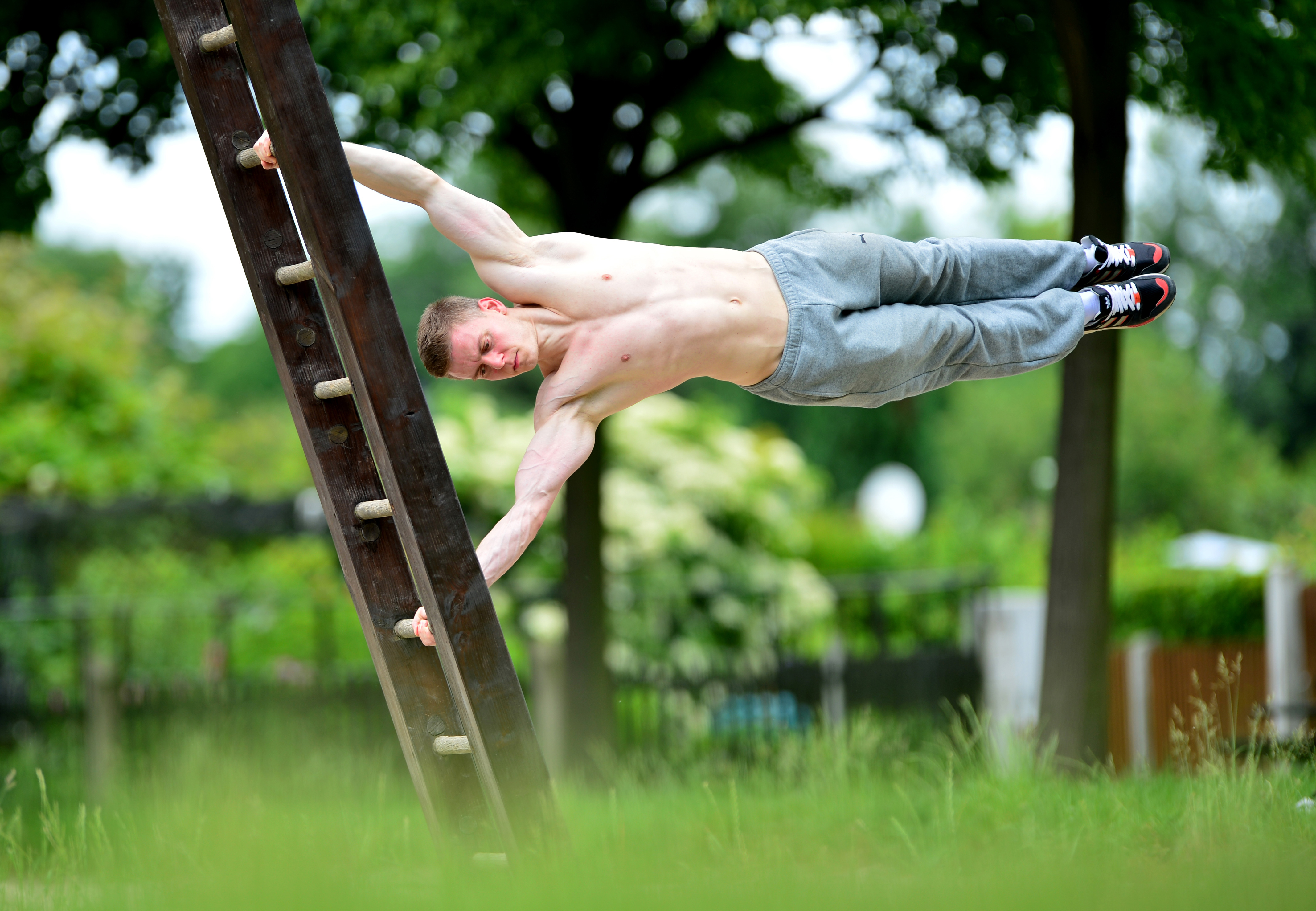 Human Flag von Sven Kohl (Calisthenic Movement)